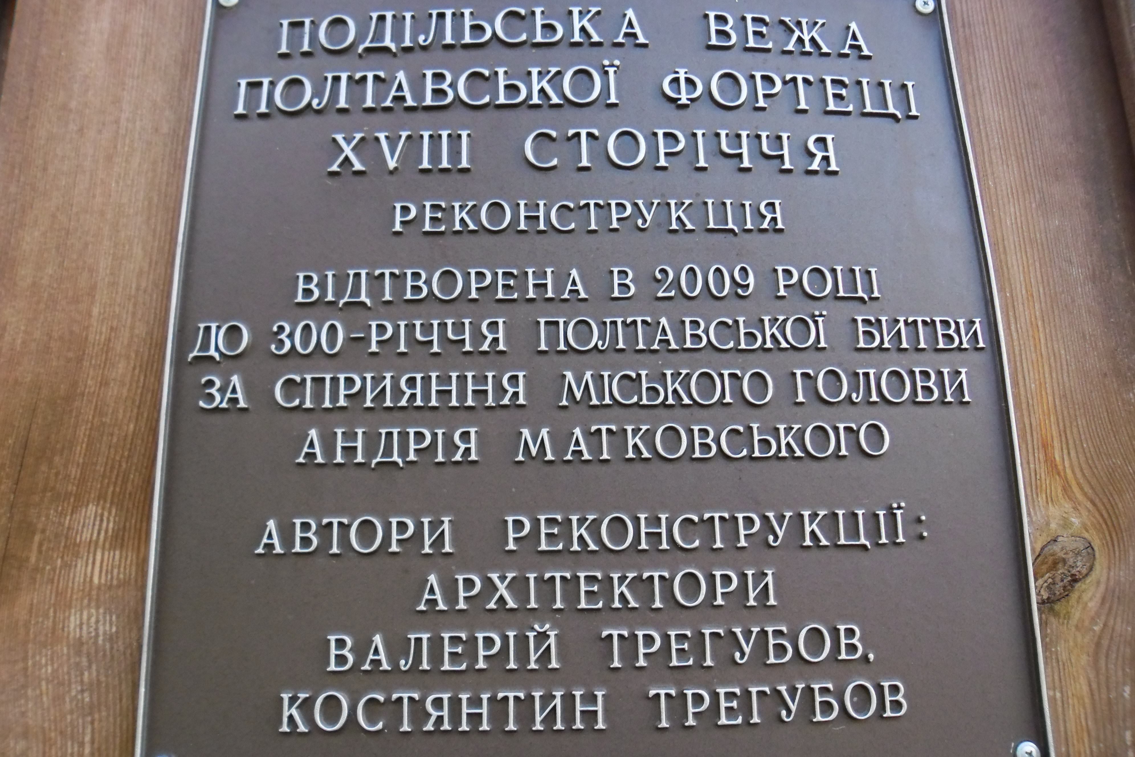 Полтавська фортеця